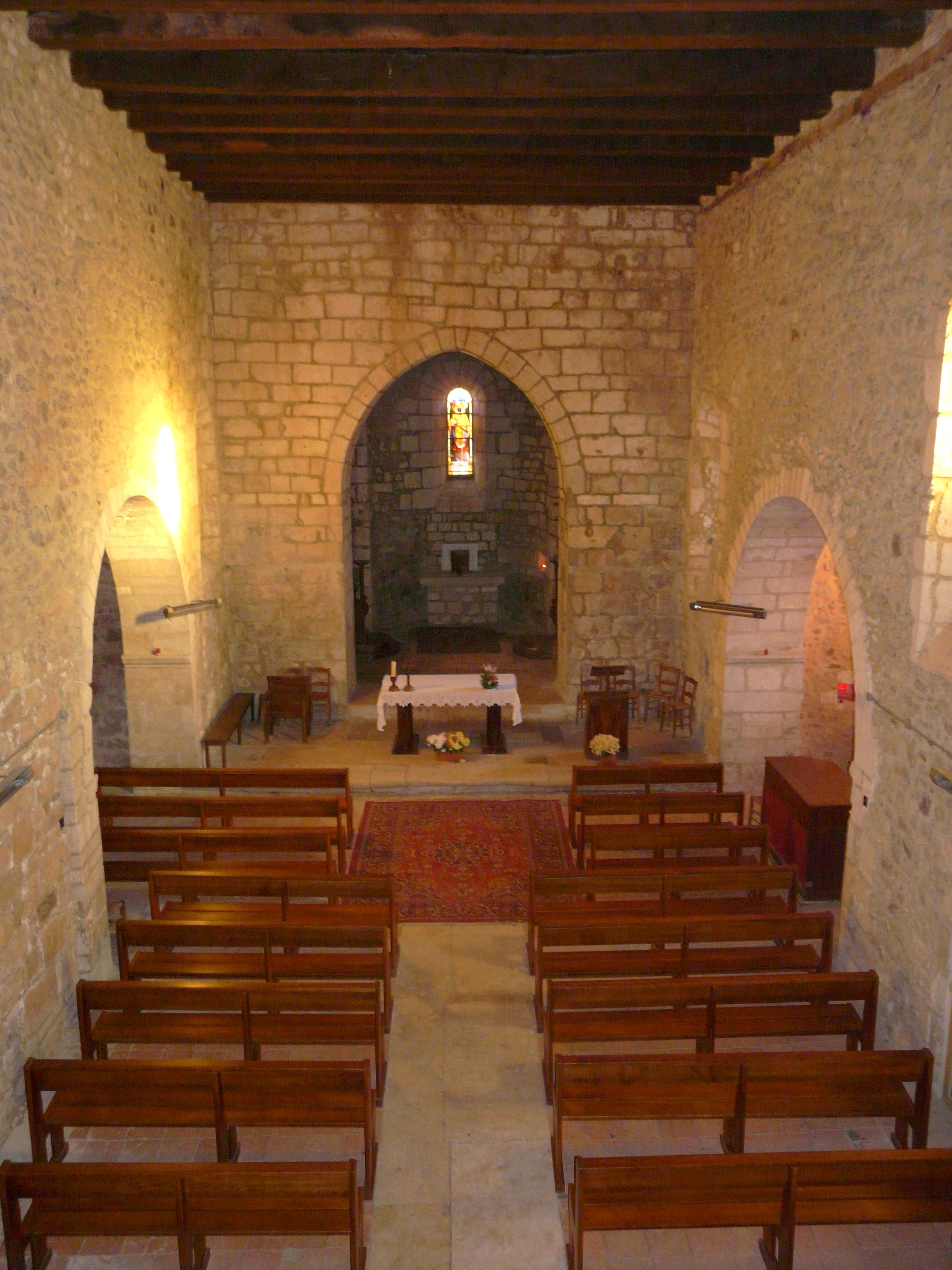 La nef de l'église Saint-Martin, Milhac-de-Nontron, Dordogne, France.